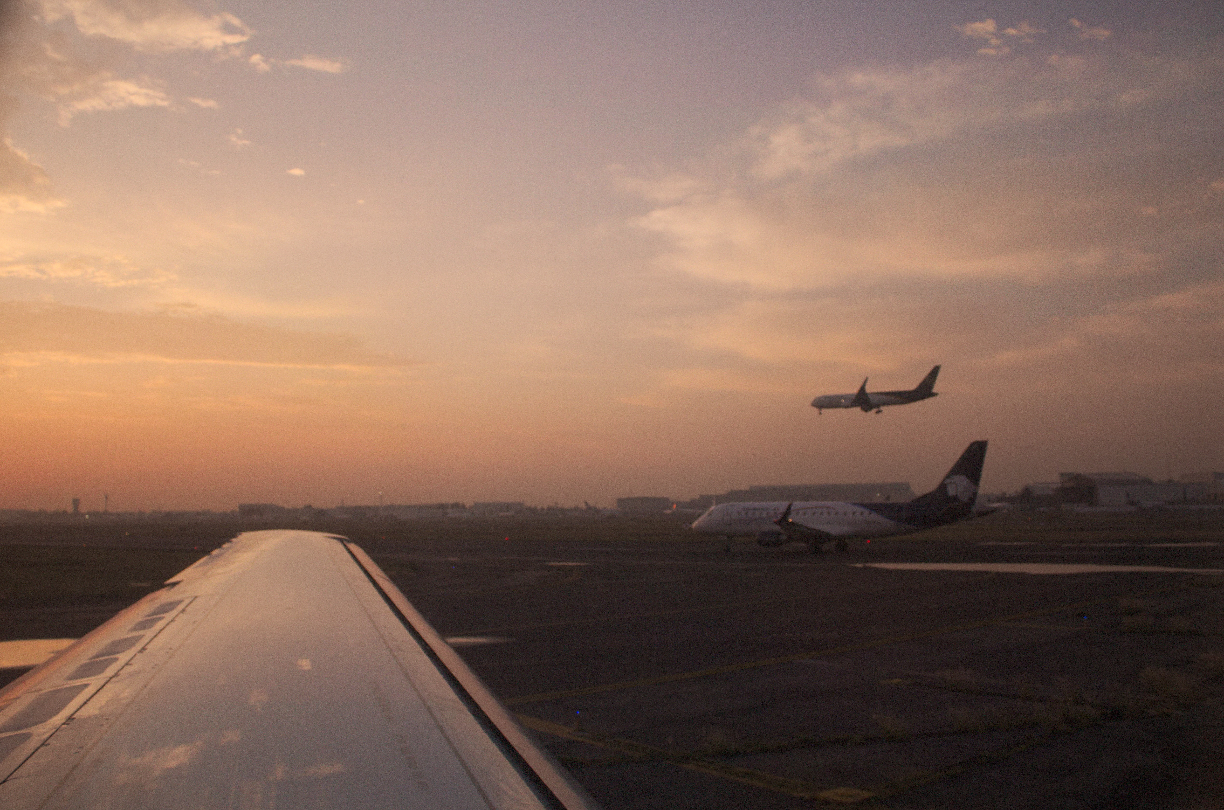 Serie de fotografías en el aereopuerto de la CDMX.